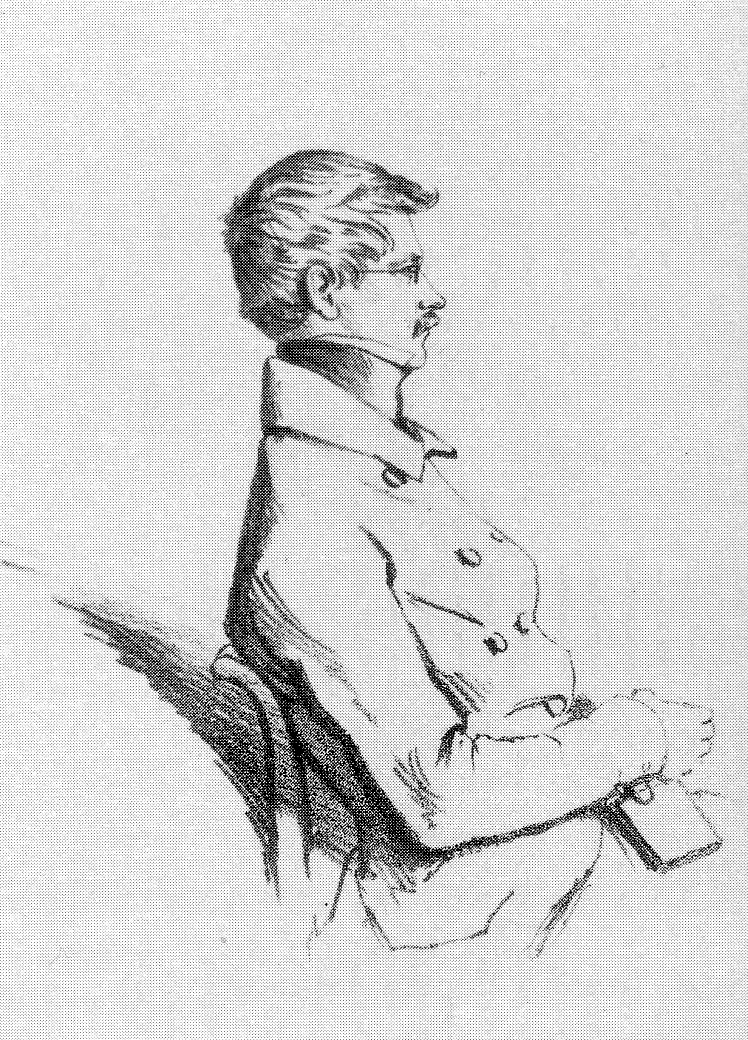 Karl Theodor Gravenhorst (1810-1886), Abgeordneter der Paulskirche